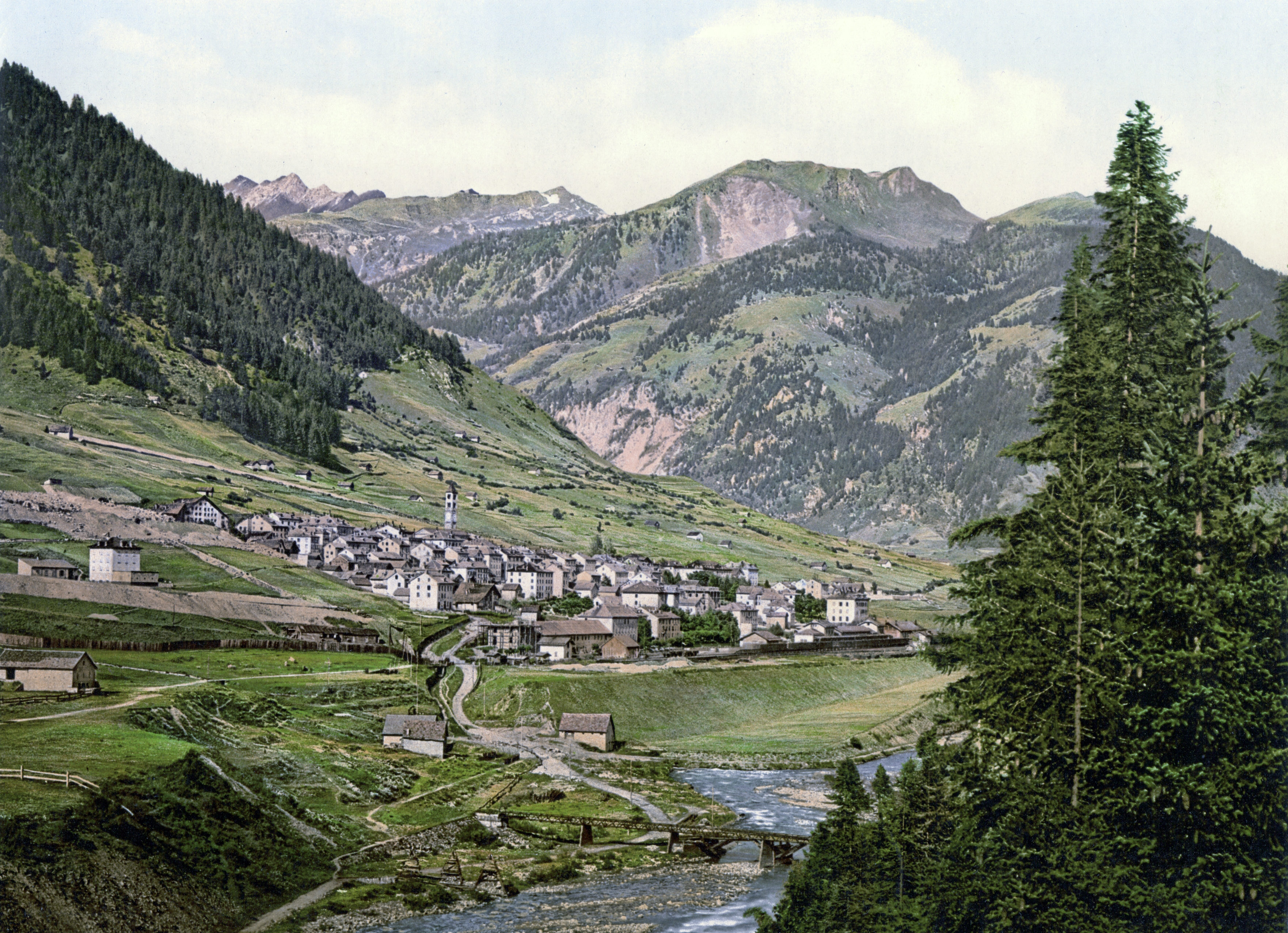 Imagen del pueblo de Airolo entre 1890 y 1900